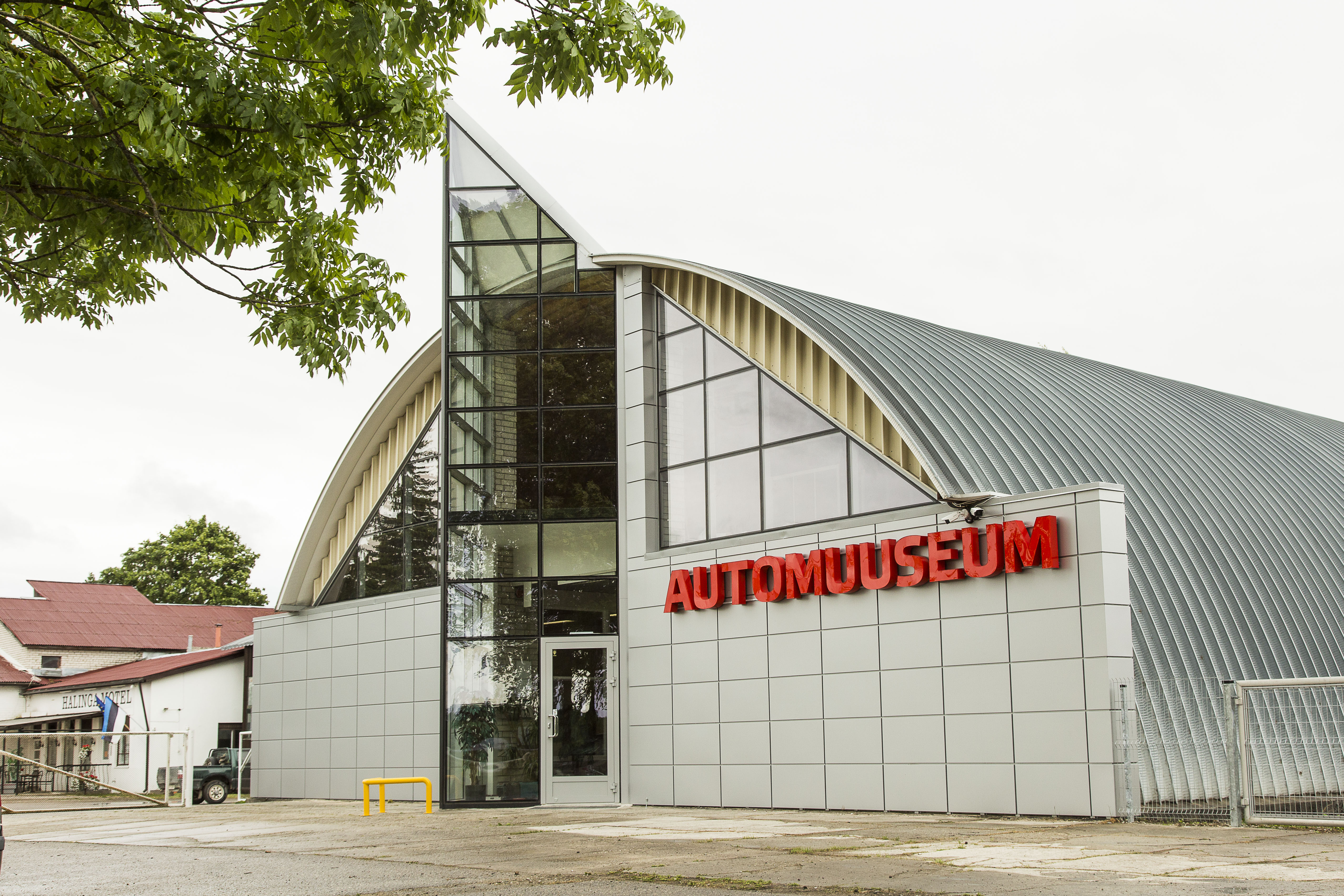 Automuuseumi uus kodu Halinga vallas Pärnumaal.